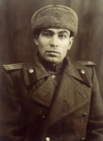 Francisco Romero Marín (Nerva, 23 de marzo de 1915 – Madrid, 16 de marzo de 1998) fue un político y militar español, de ideología comunista. Durante la Guerra civil fue oficial del Ejército republicano, llegando a mandar varias unidades. Miembro del Partido Comunista de España (PCE), durante la dictadura de Franco fue un destacado dirigente antifranquista.